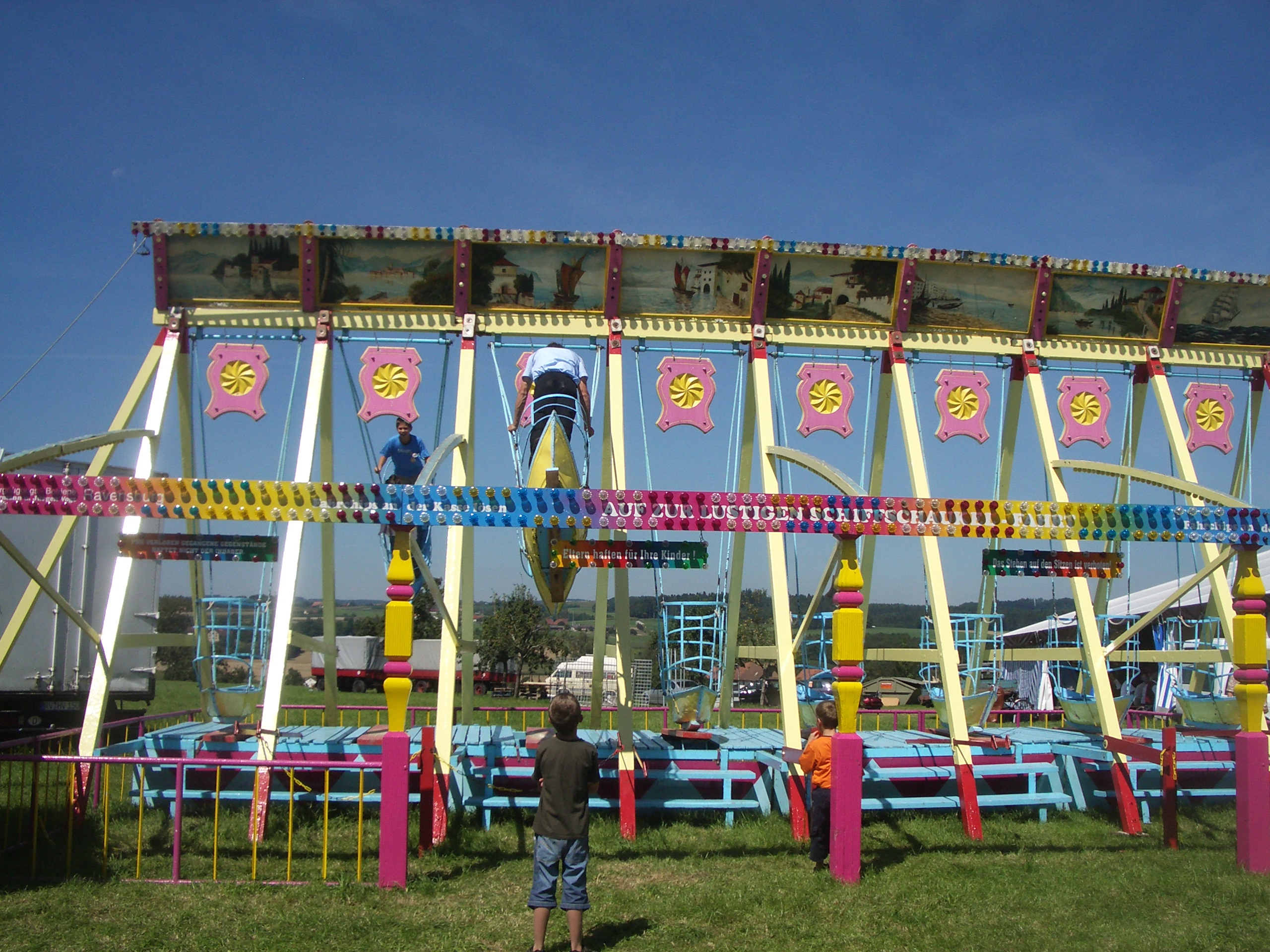 Schiffschaukel beim Bergfest, D-88276 Berg